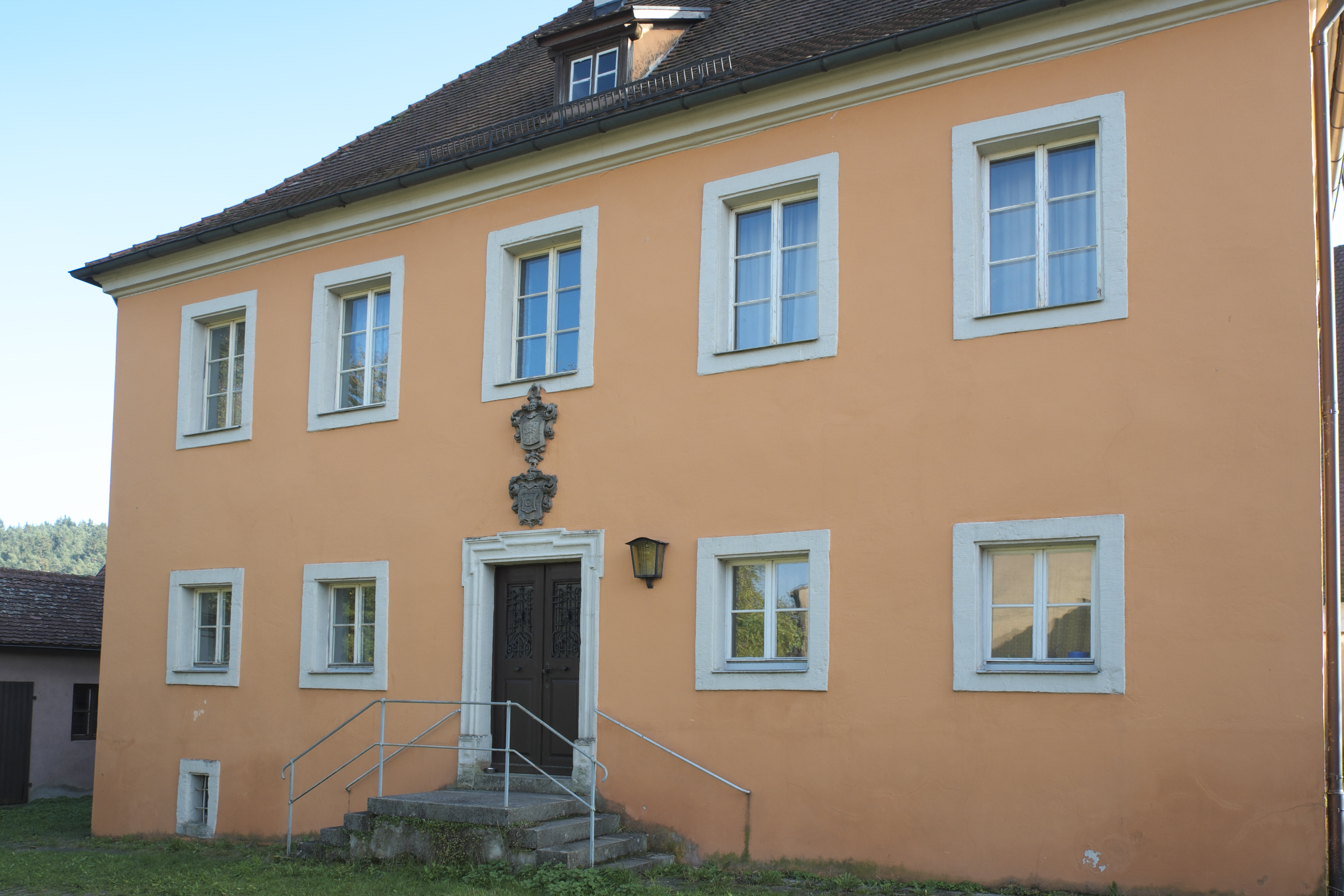 Pfarrhaus neben der katholischen Pfarrkirche St. Petrus und Paulus in Halsbach, einem Ortsteil von Dürrwangen im Landkreis Ansbach (Mittelfranken/Bayern)